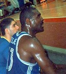 קווין מגי, במסגרת משחק הכדורסל בין קבוצות מכבי ת"א נגד הפועל גליל עליון באולם בכפר בלום